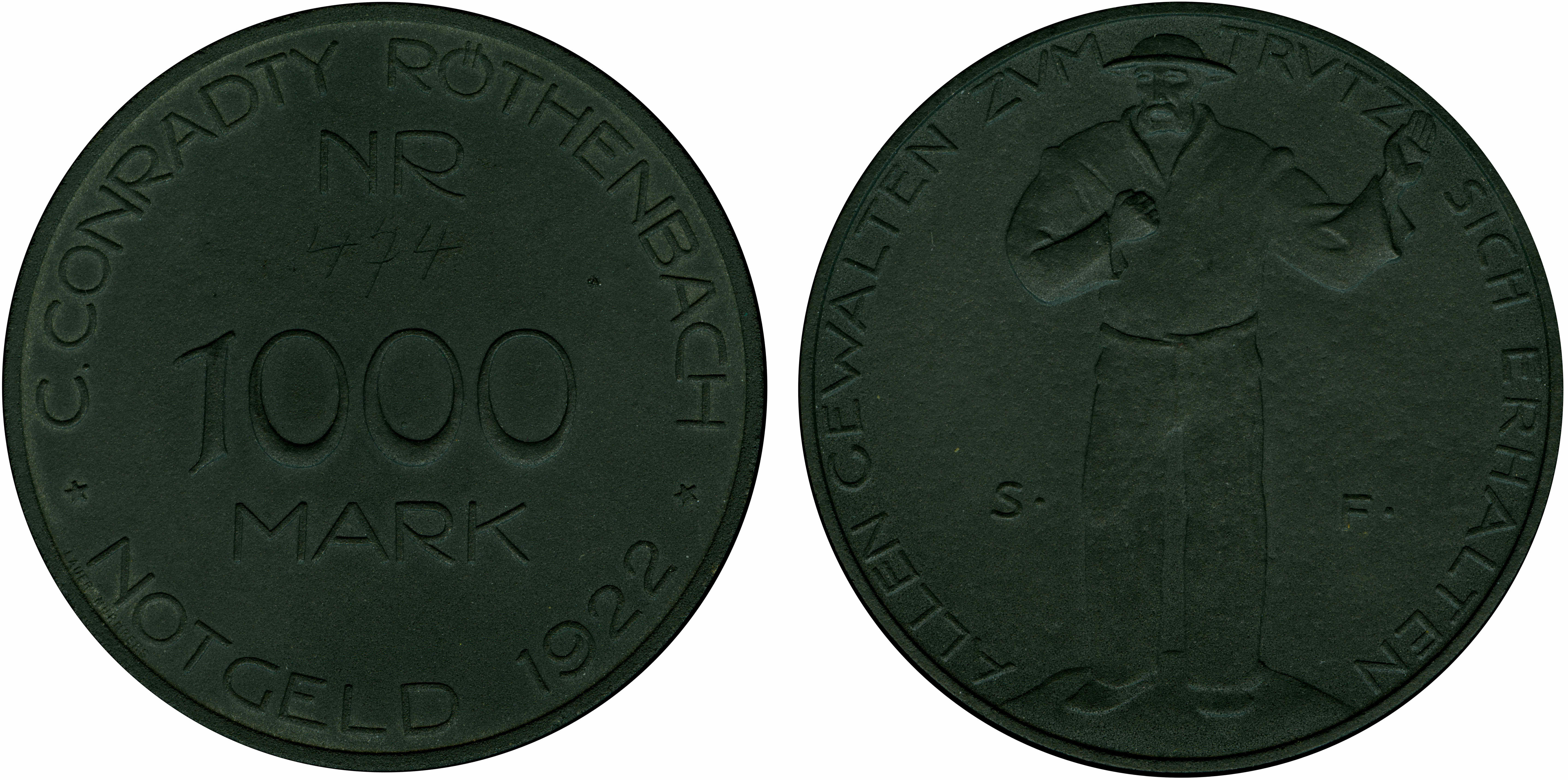 1000 Mark Kohlemünze 1922 C. Conradty Röthenbach Auflage: 2500Ex. Durchmesser: 70mm Kröner Katalog: C1.3